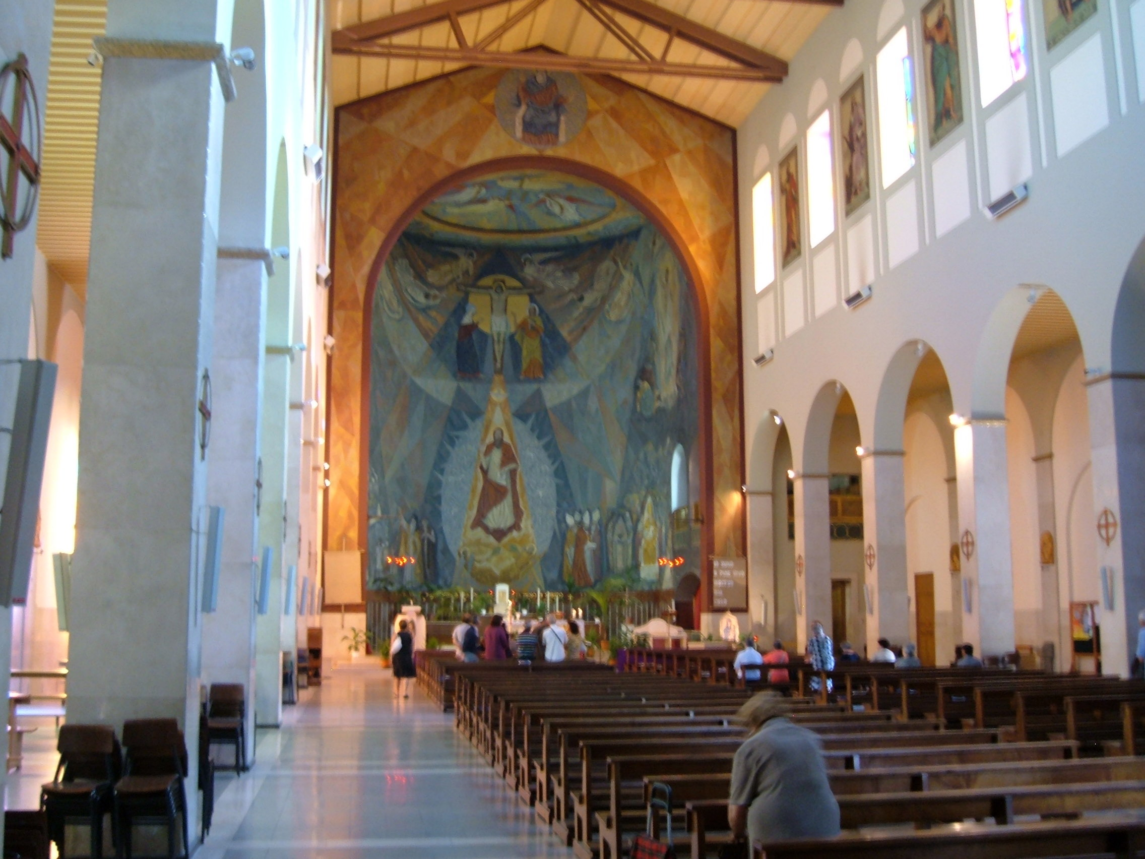 Chiesa di San Barnaba apostolo, a Roma, nel quartiere Prenestino-Labicano. Interno.